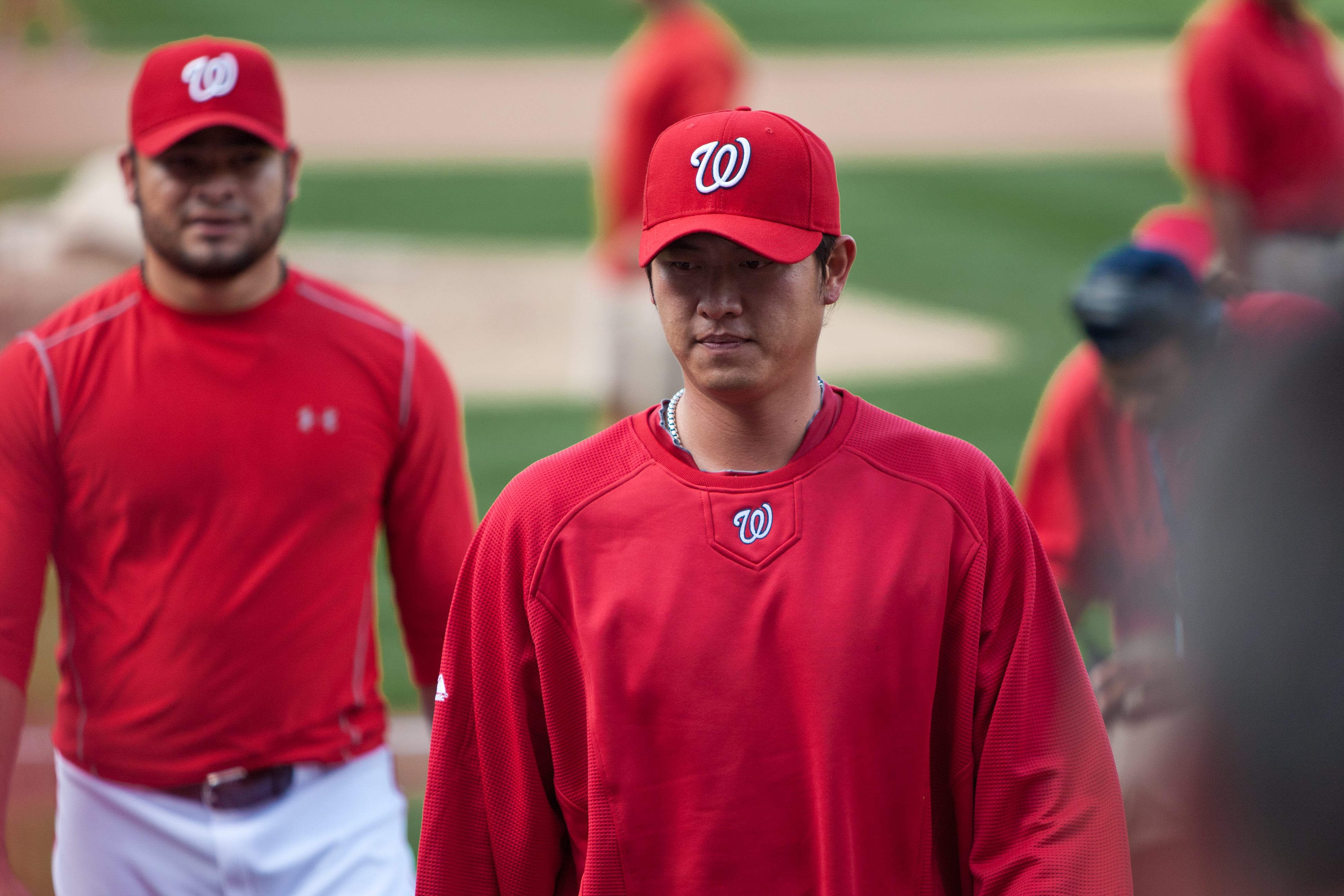 Chien-Ming Wang